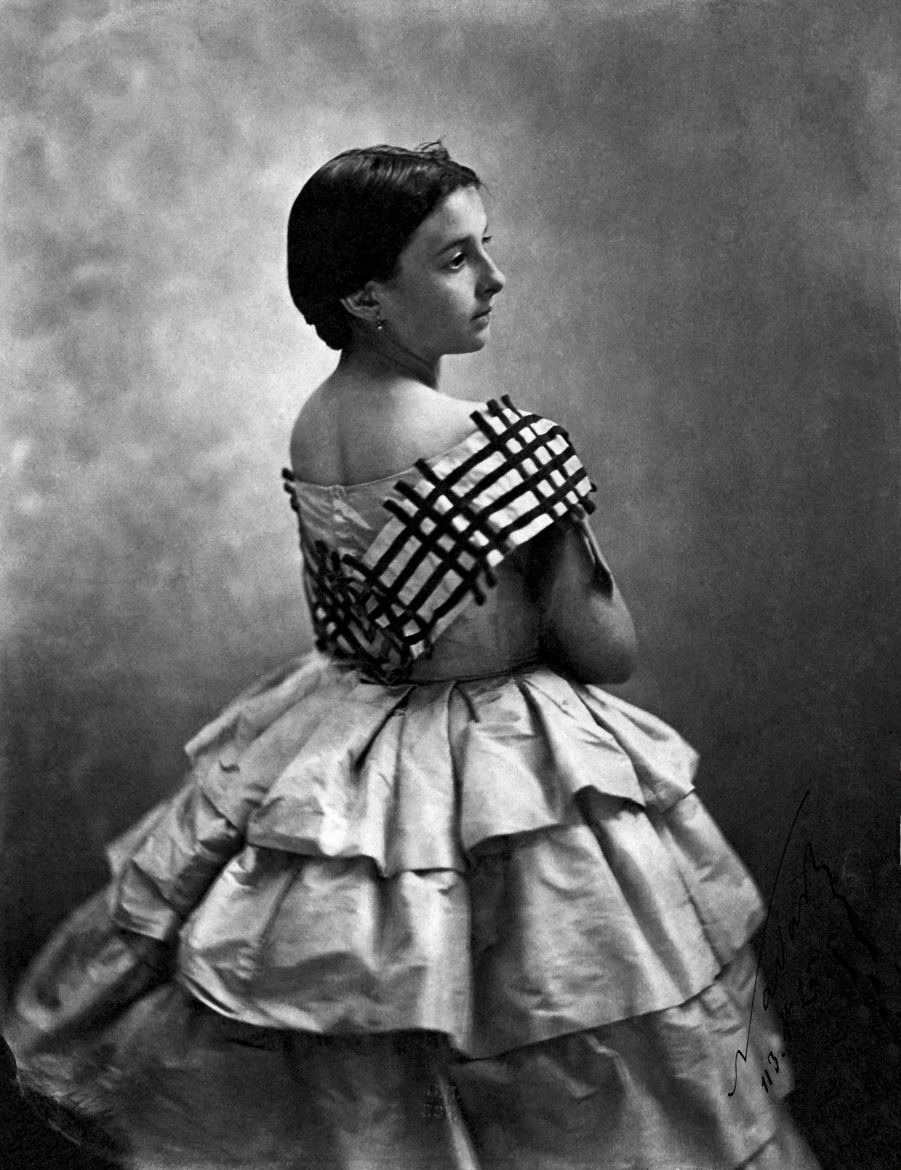 Céline Montaland (1843–1891), French actor, dancer and singer.